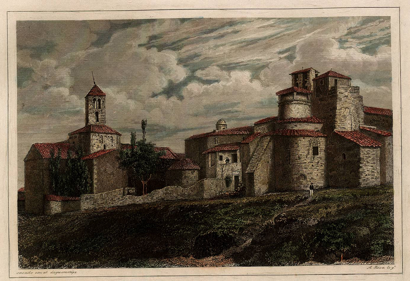 Vista exterior de las tres iglesias de San Pedro, de Tarrasa.